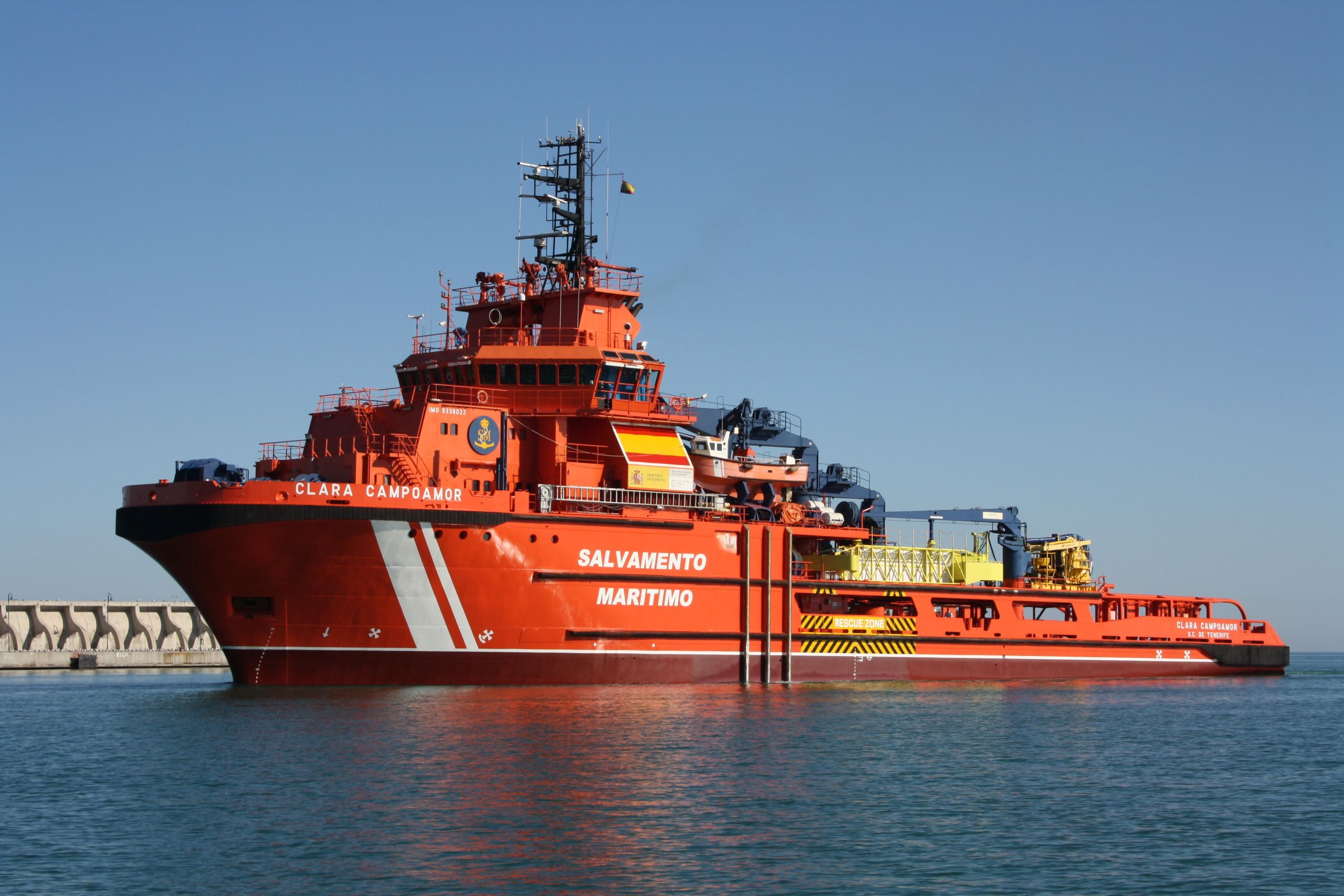 País: España - Salvamento Marítimo Clase, [Tipo]: Don Inda. Constructor: Astilleros Zamakona, Bilbao, España. Fecha alta: 10 de abril de 2007. Dimensiones ( metros ): 80 x 18 x ? Propulsión: 4 x diesels Bergen B32:40L8P, 2 x hélices. Velocidad ( nudos ): 17,5. Autonomía ( millas ): 9.000. Dotación: 18 + 6. Capacidad de transporte: 1.507,9 m3 gasoil, 531,8m3 agua, espuma 41,7m3, detergente 25,4m3, residuos hidrocarburos 1.748,4m3. Rádar: 1 x banda X, 1 x banda S. Indicativo: EAIK Comentario: Dispone de dos pequeñas embarcaciones auxiliares, la primera de ellas se utiliza para tareas de rescate y salvamento, y la segunda para tareas de recogida de residuos, tendido de barreras, remolque, etc...